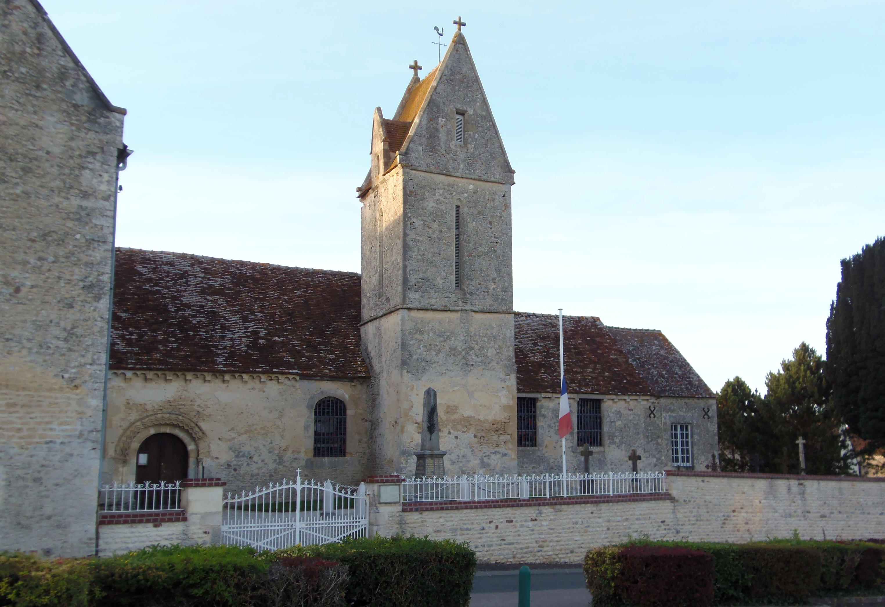 Saint-Pierre-du-Bû (Normandie, France). L'église Saint-Pierre.